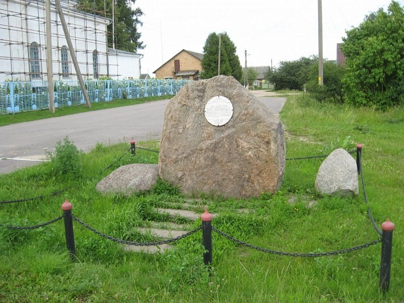 Сталовічы. Валун з надпісам «12 IX 1771 тут адбылася бiтва канфедэратаў гетмана М.К.Агiнскага з войскамi А.Суворава. Pokoj ich duszom»